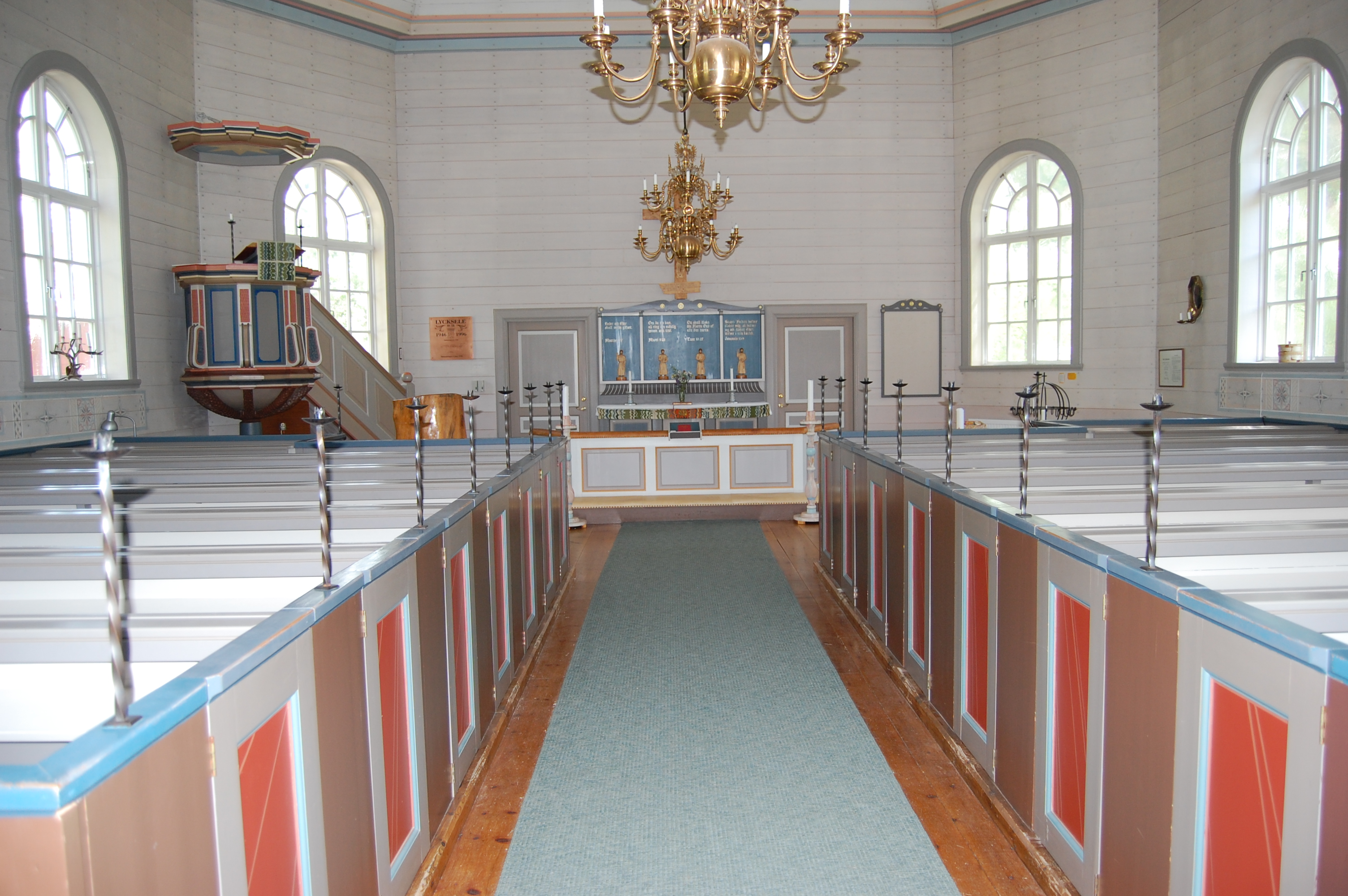 Margaretakyrkans kyrkosal